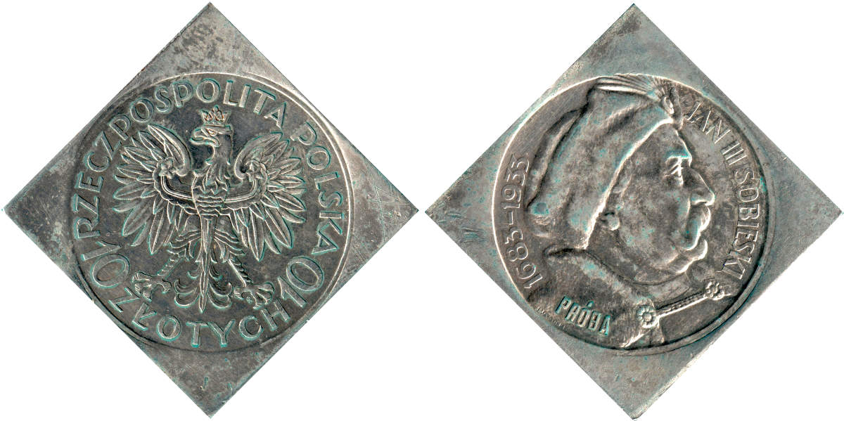 Klipa 10 zlotych Jan III Sobieski